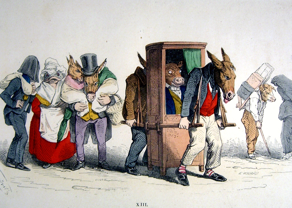 Tiere als Menschen verkleidet. Lithographie von Grandville, 19. Jh.